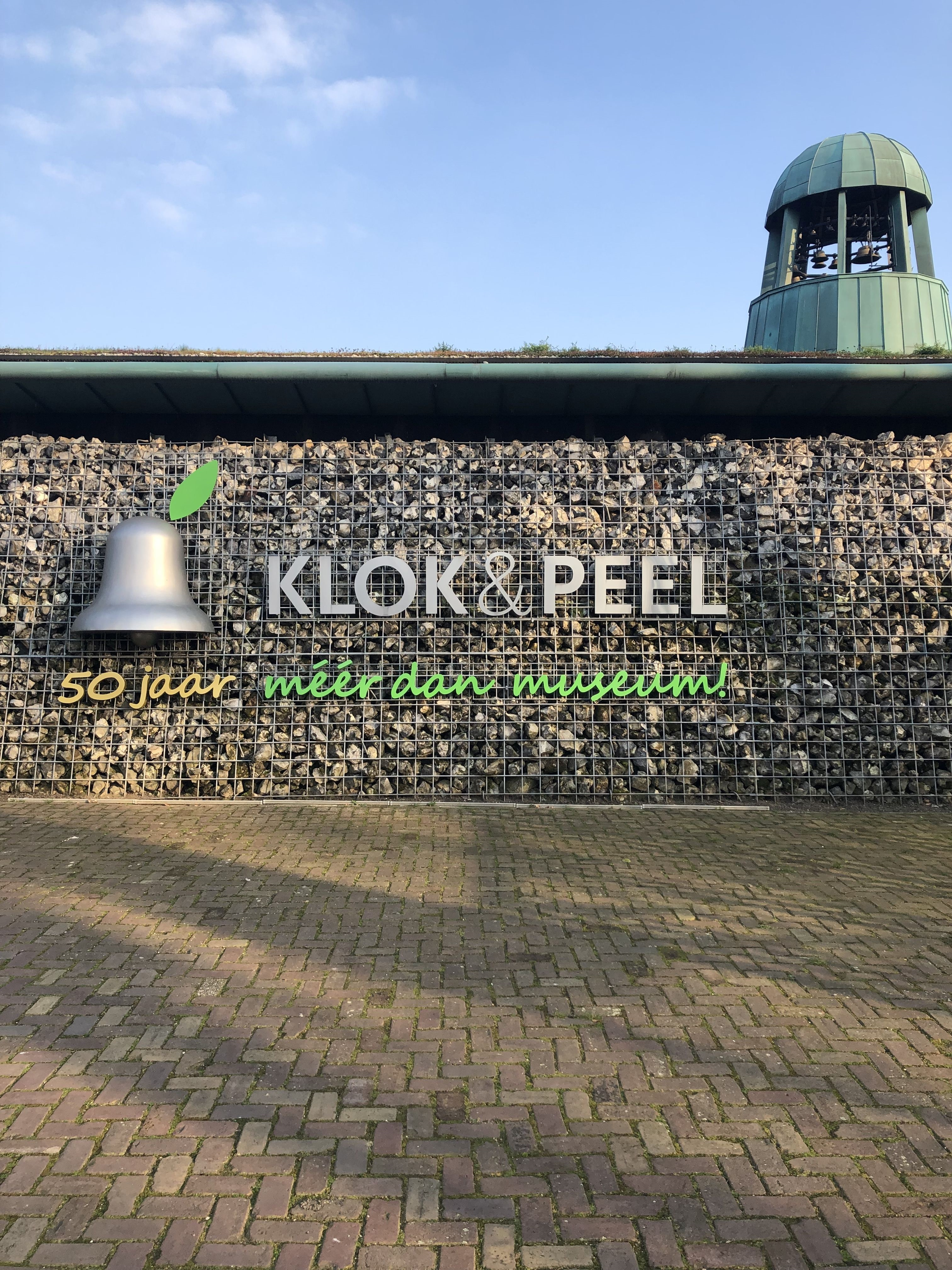 Ingang Museum Klok & Peel met de museumtoren